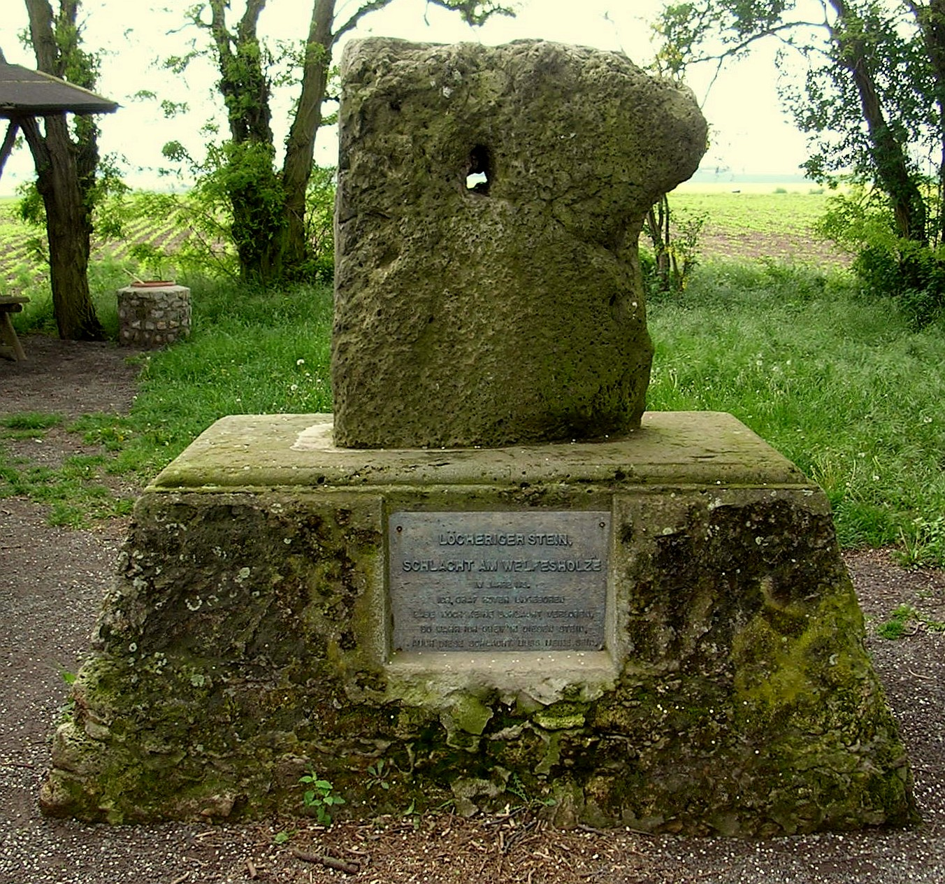 Hoyerstein oder löcheriger Stein bei Gerbstedt zu Ehren des Grafen Hoyer I. von Mansfeld